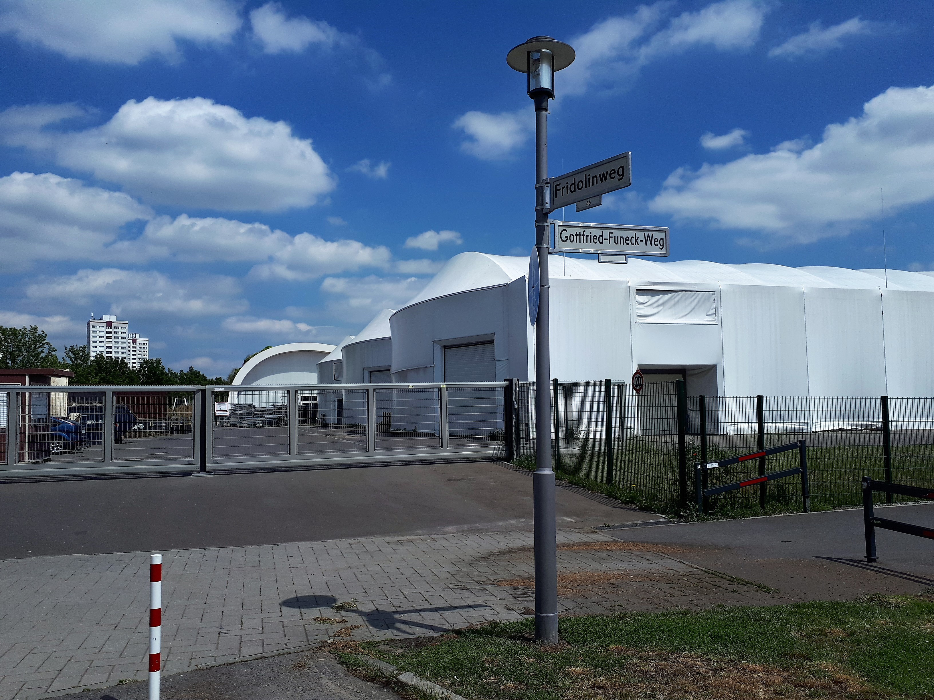 Biesdorf Gottfried-Funeck-Weg Blick auf Blumenhallen der Gärten der Welt